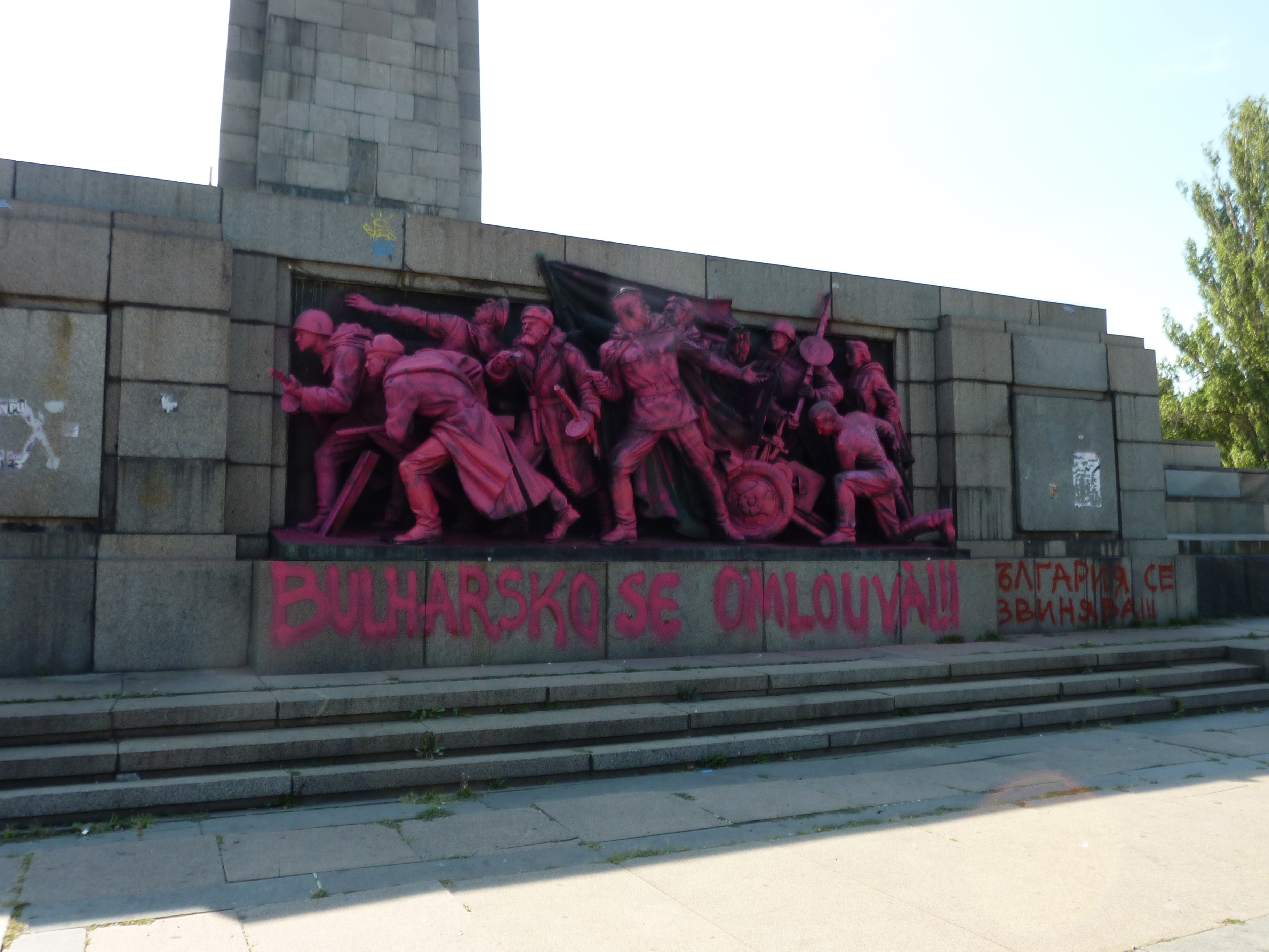 Скулптури от Паметника на Съветската армия изрисувани в попарт стил (21 August 2013 г.)